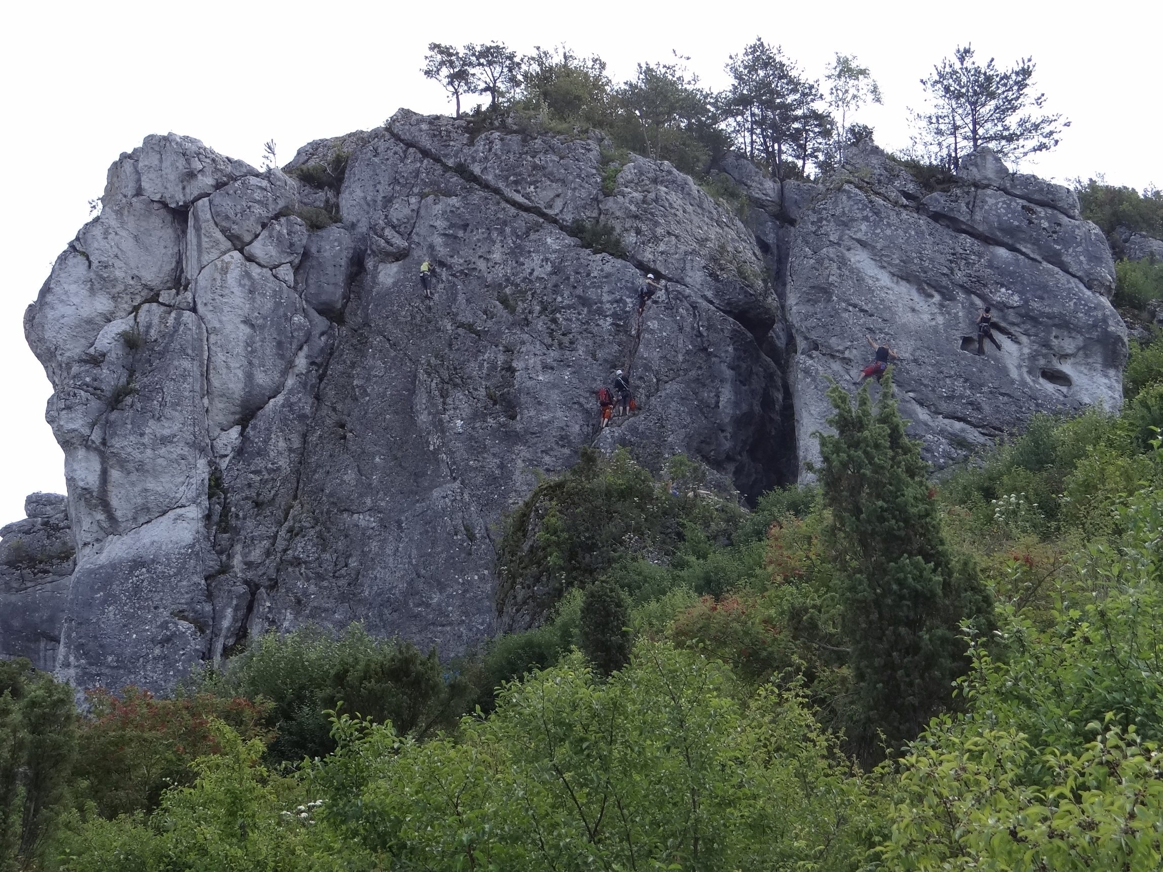 Turnia Kukuczki w grupie Skał Mirowskich. Widok od zachodu